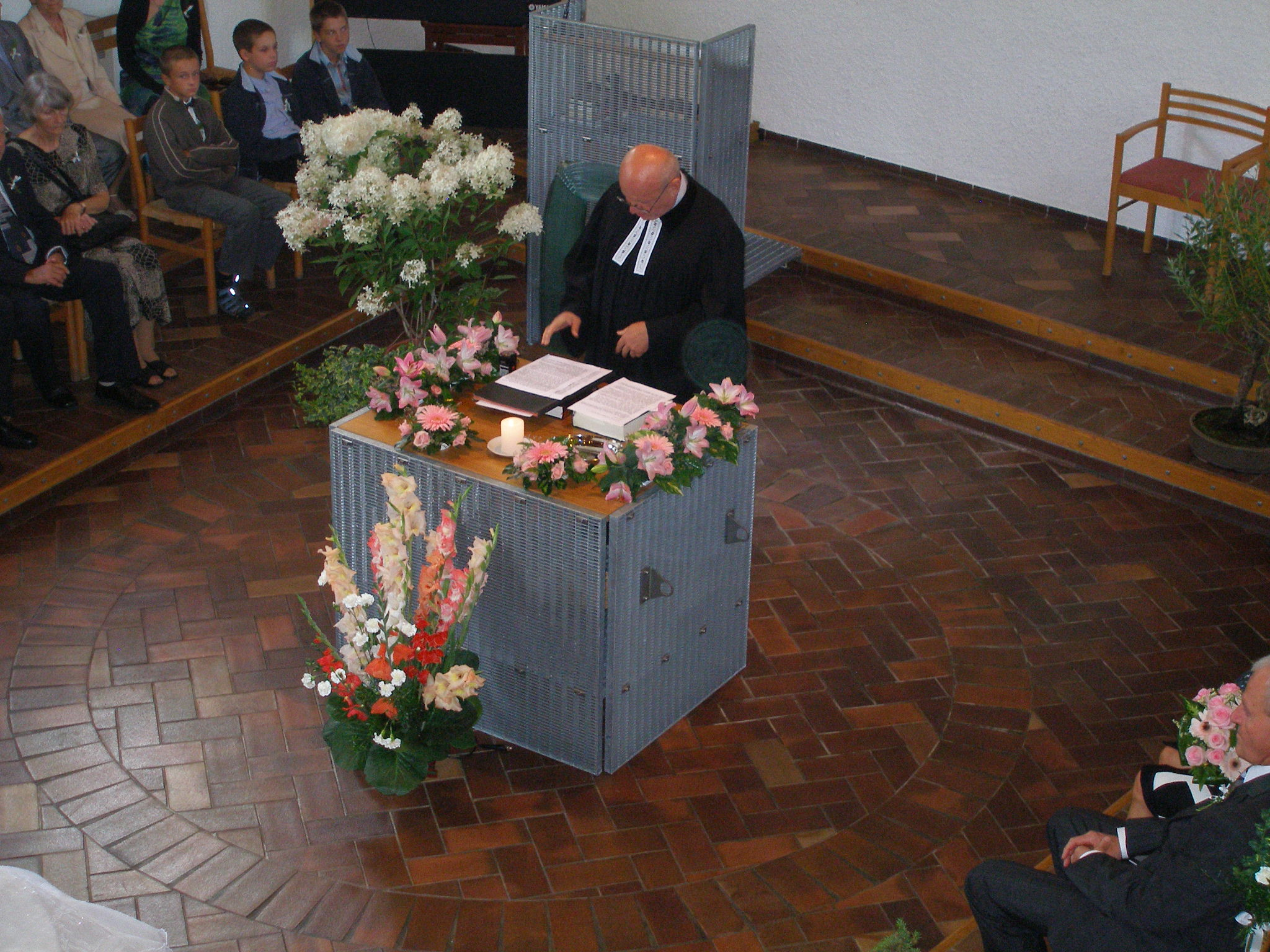 Miloš Rejchrt na svatbě MUDr. Josefa Marka v kostele U Jákobova žebříku.